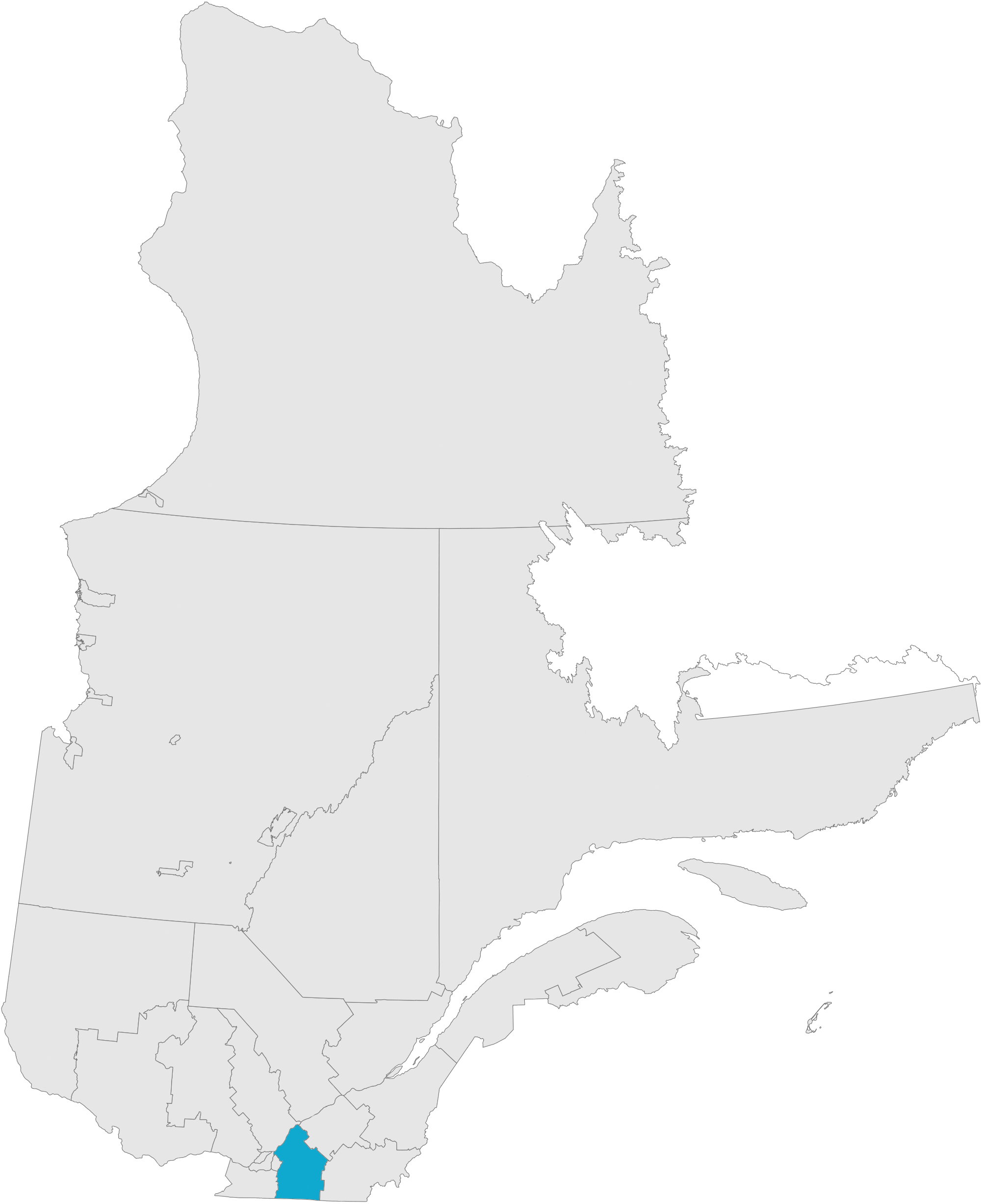 Carte de la conférence régionale des élus de la Montérégie-Est